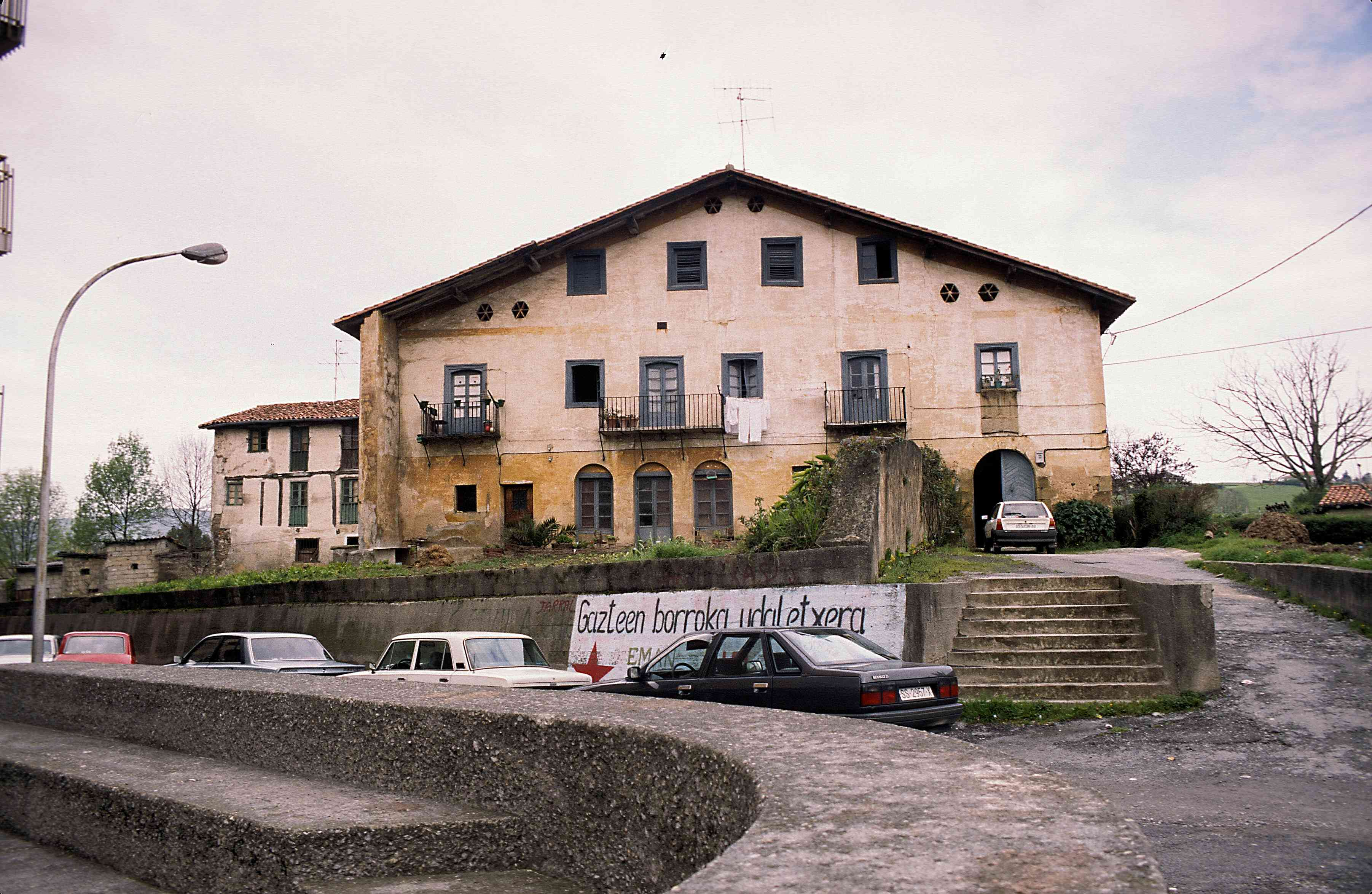 Gaztañaga baserria (Usurbil) 1988an. Eraikitako euskal ondare nabaria izendatua.